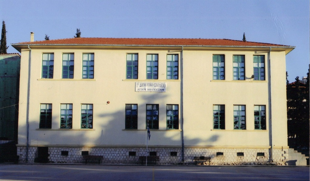 dimotiko